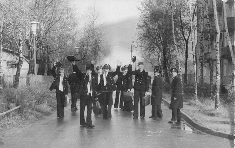 Автор фото - Андрей Жернаков